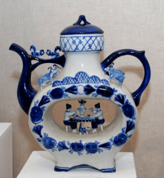 Квасник.Фарфор.Гжель.автор Л.Азарова